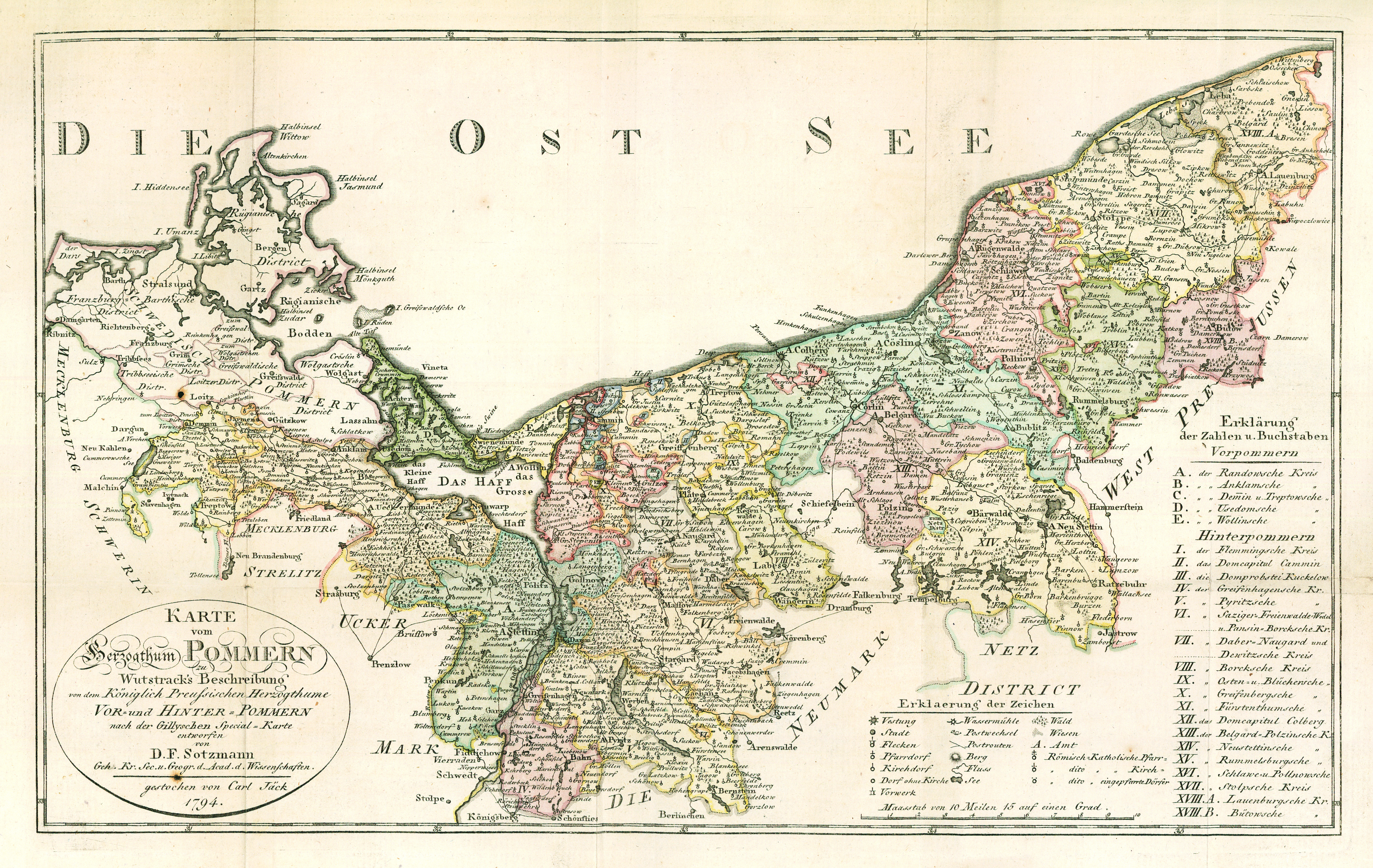 Landkarte des Herzogtums Vor und Hinterpommern, von D. F. Sotzmann, 1794